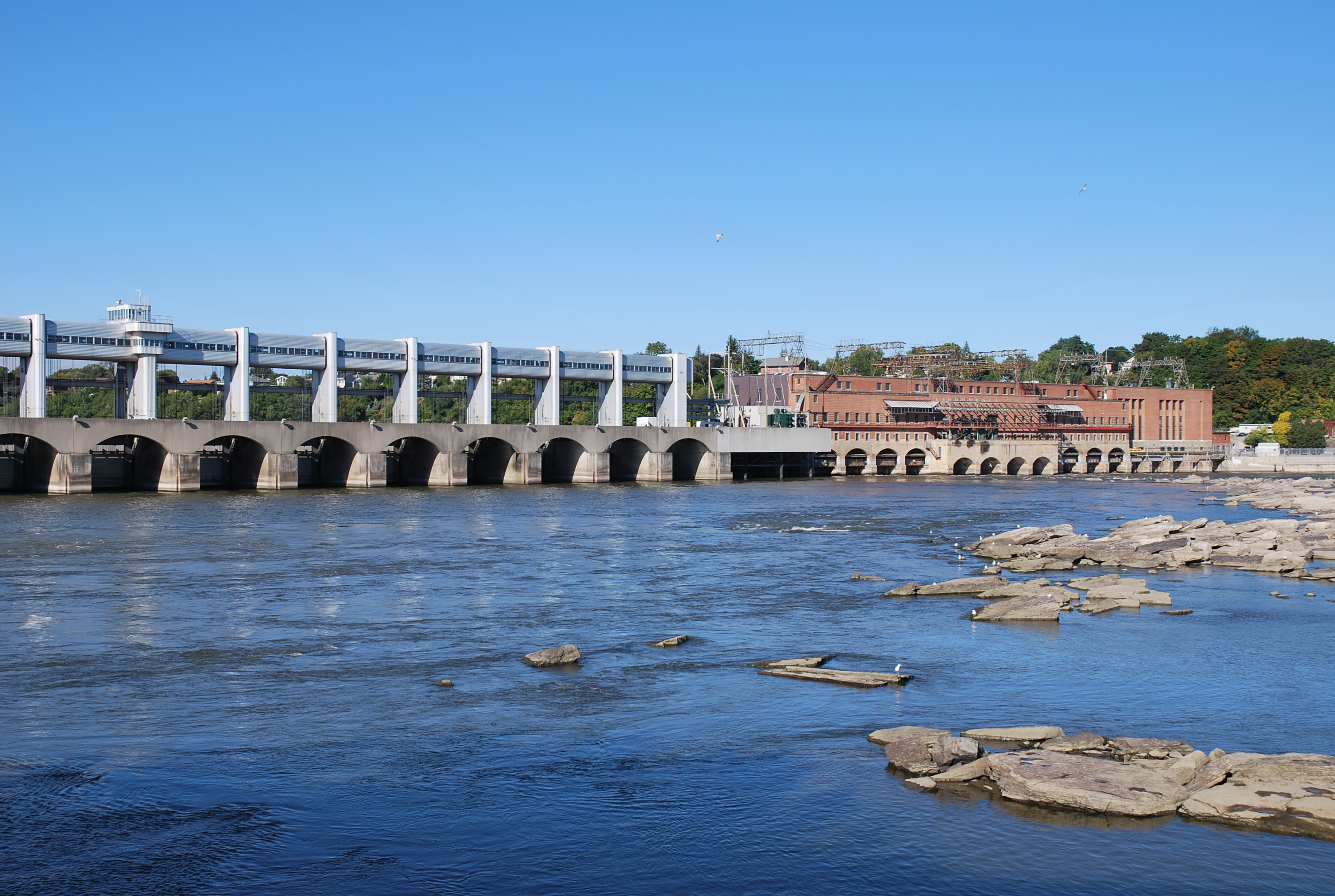 Rivière des Prairies Hydroelectric Dam and Generating Station.